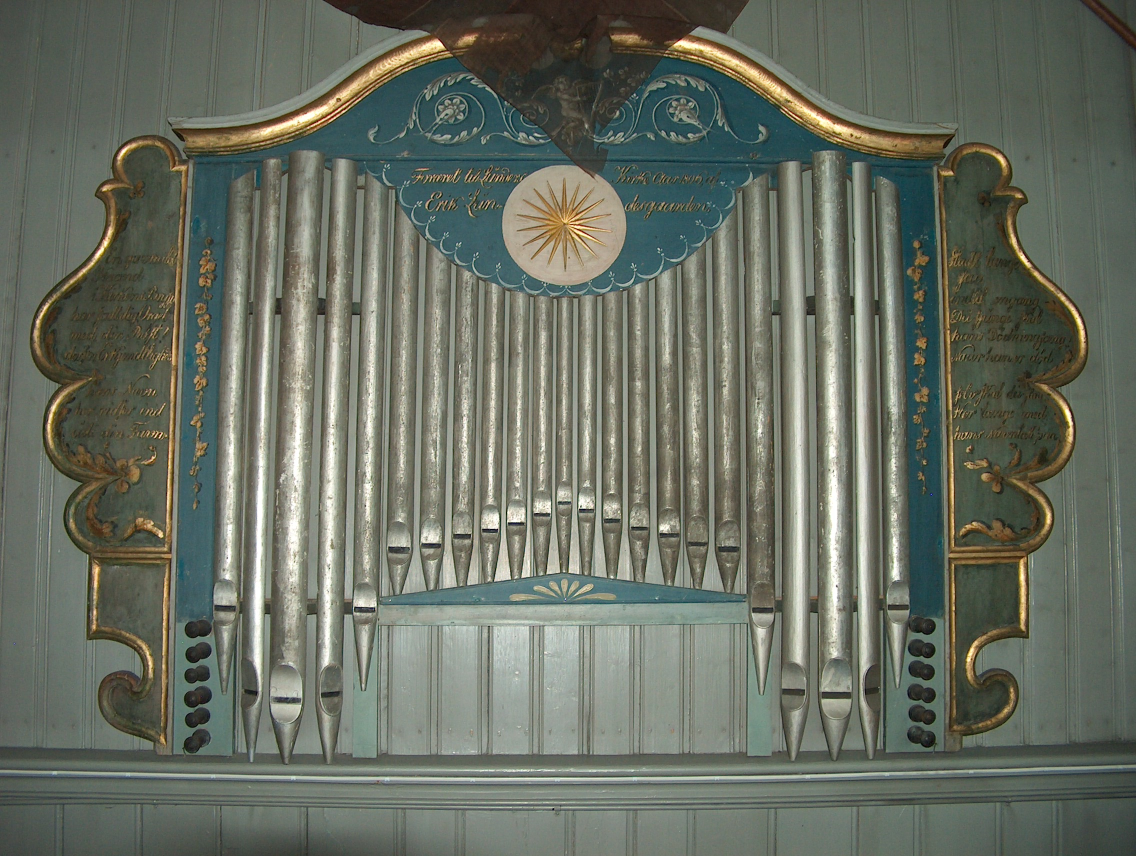 Lunder kirke, Sokna (kirkeskip 2, 1725)